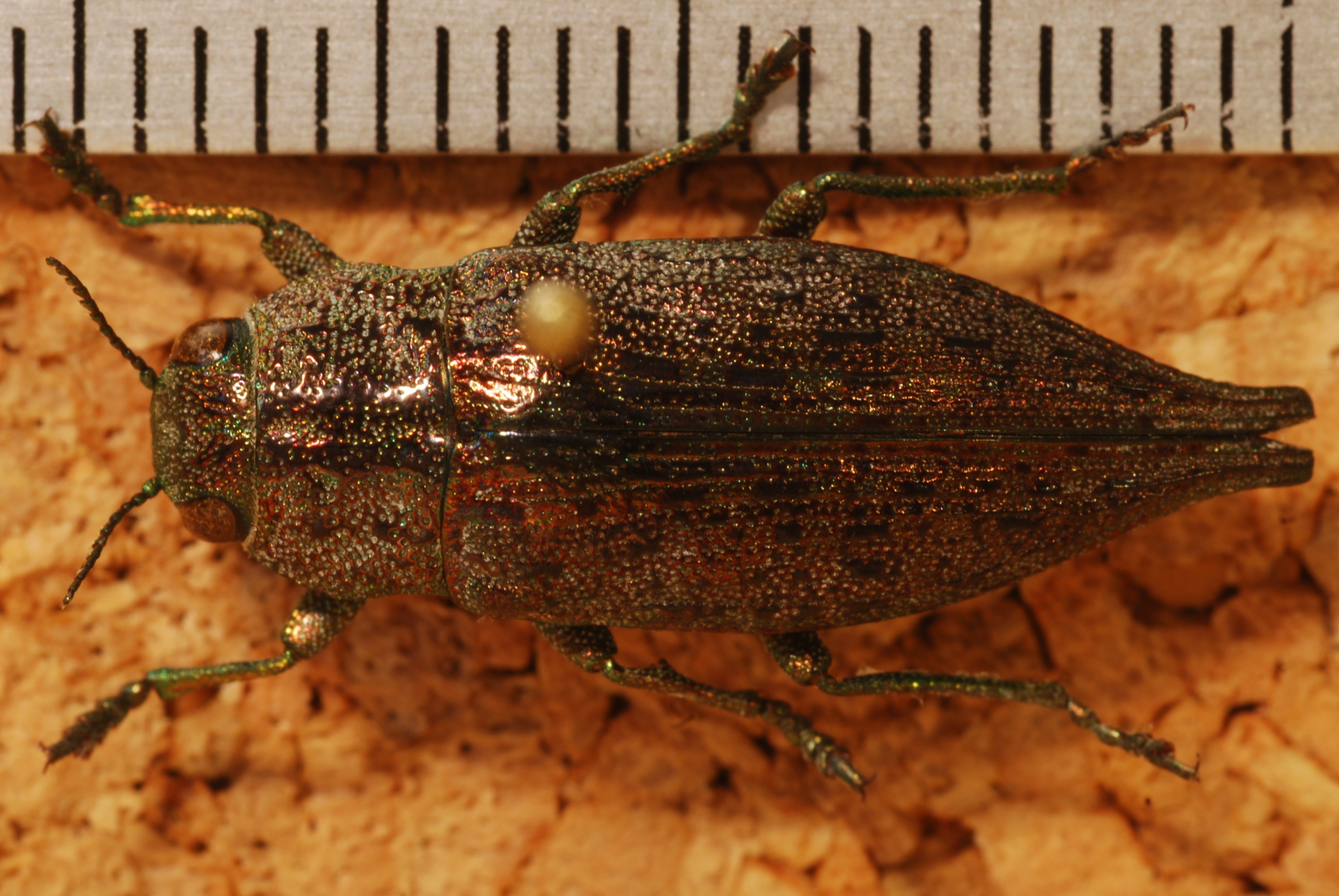 Mont Rigaud, Vaudreuil-Soulanges, Québec, CANADA